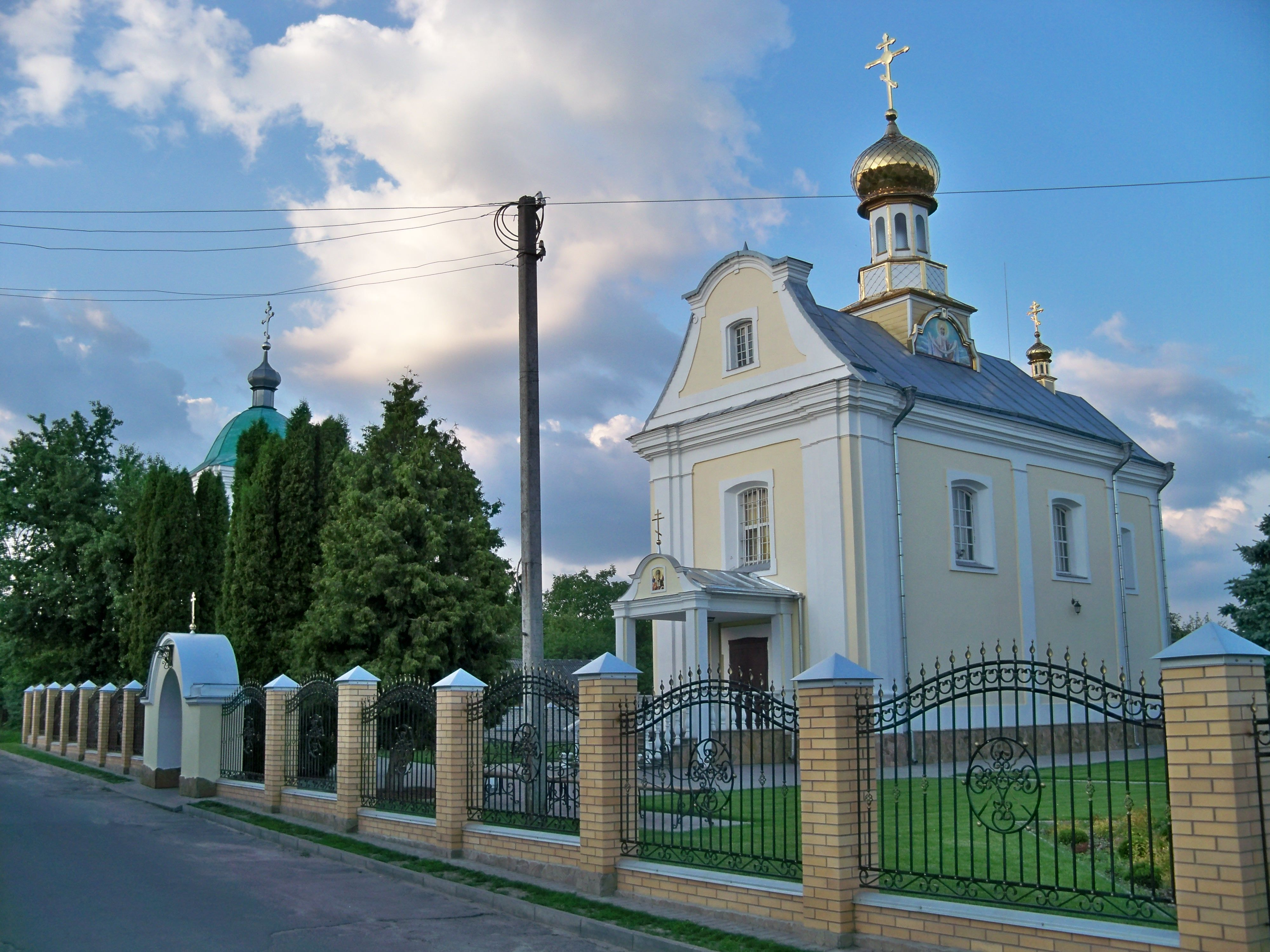 Миколаївська церква (мур.), Володимир-Волинський, вул. Цинкаловського, 1